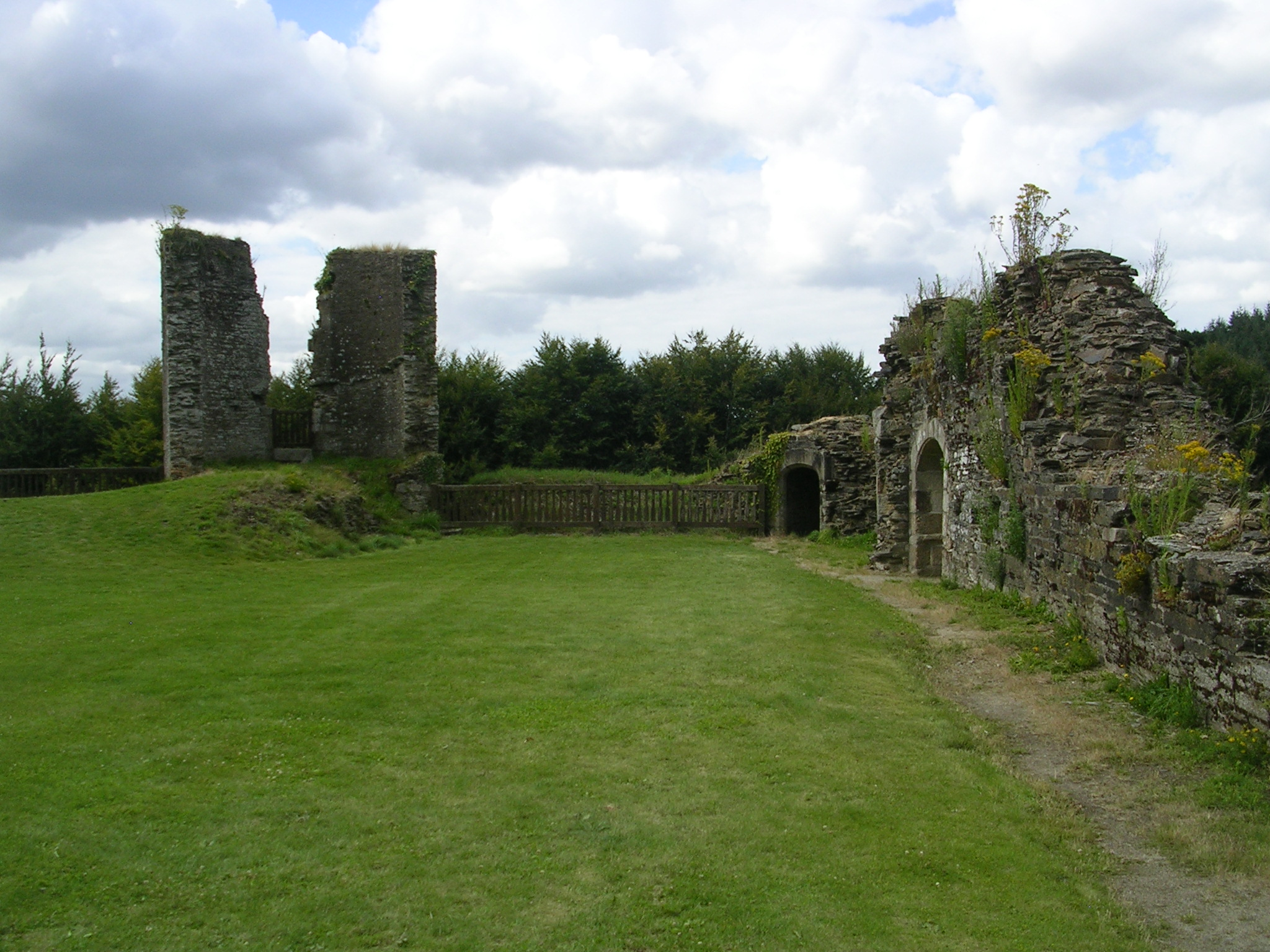 Vestiges du château de Corlay (Côtes-d'Armor, France) .